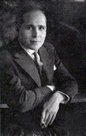 Juan Gómez Basilio Dibujante, ilustrador.